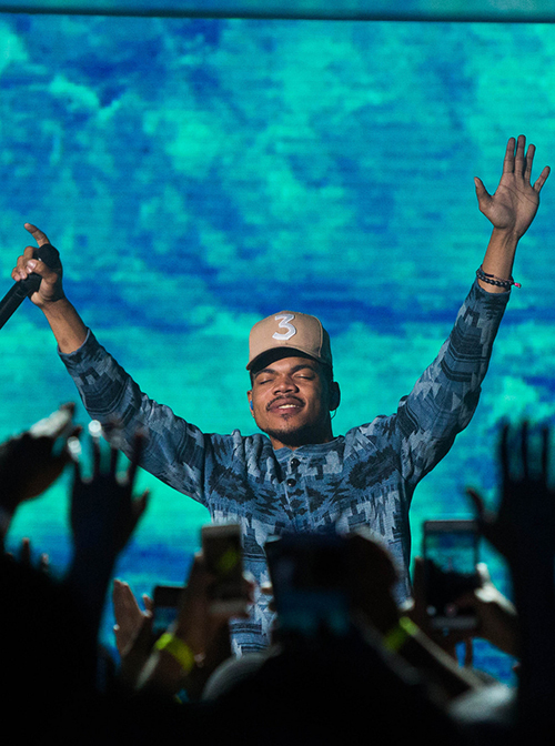 Facebook F8 Developer's Conference 2017